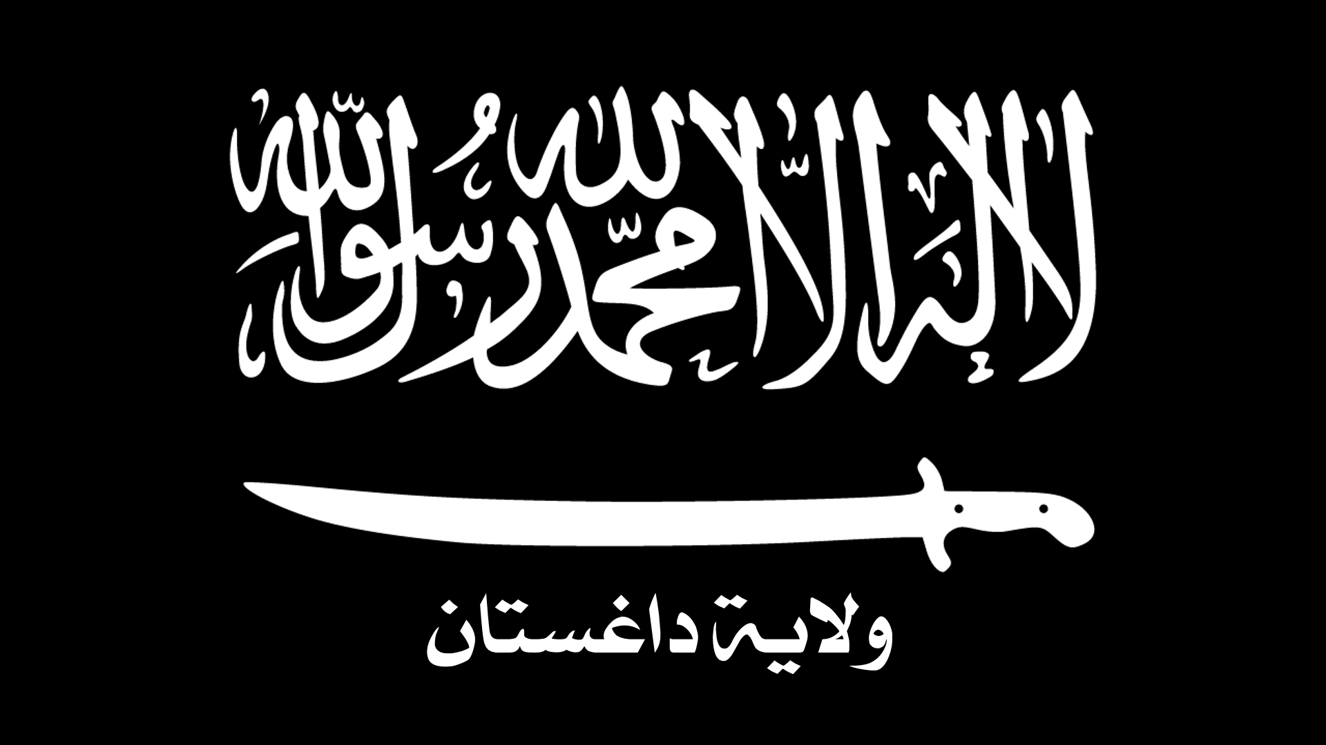 Флаг "Вилаят Дагестан"